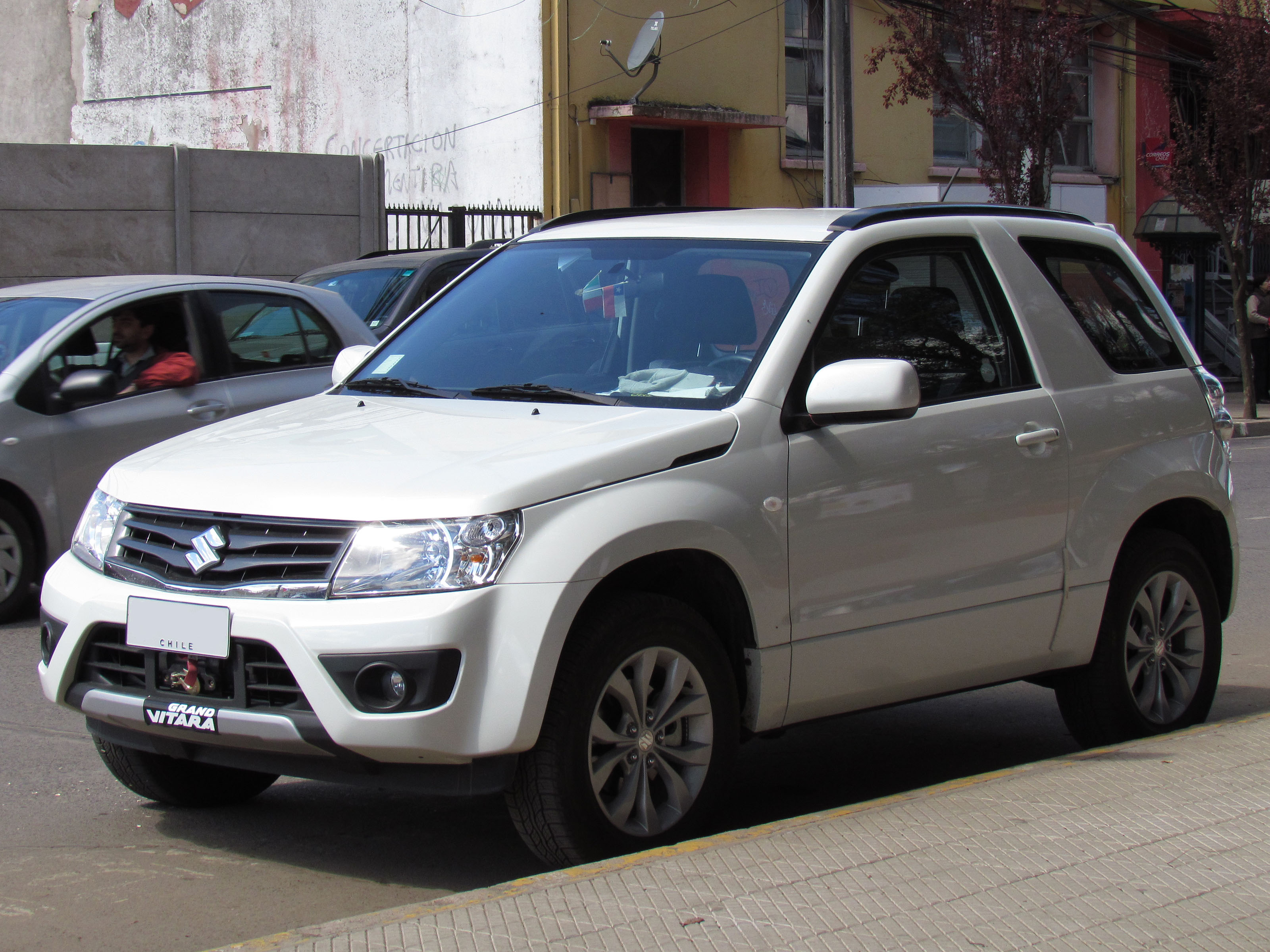 Suzuki Grand Vitara 2.4 GLX Sport 2013